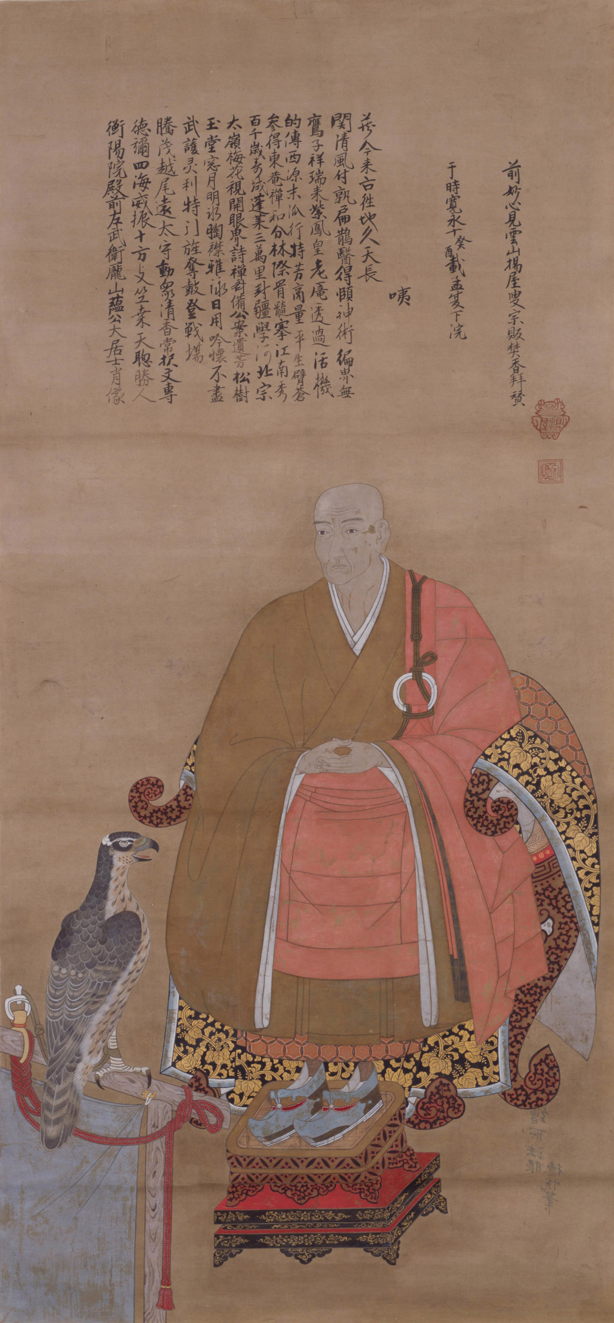 斯波義銀（津川義近）肖像